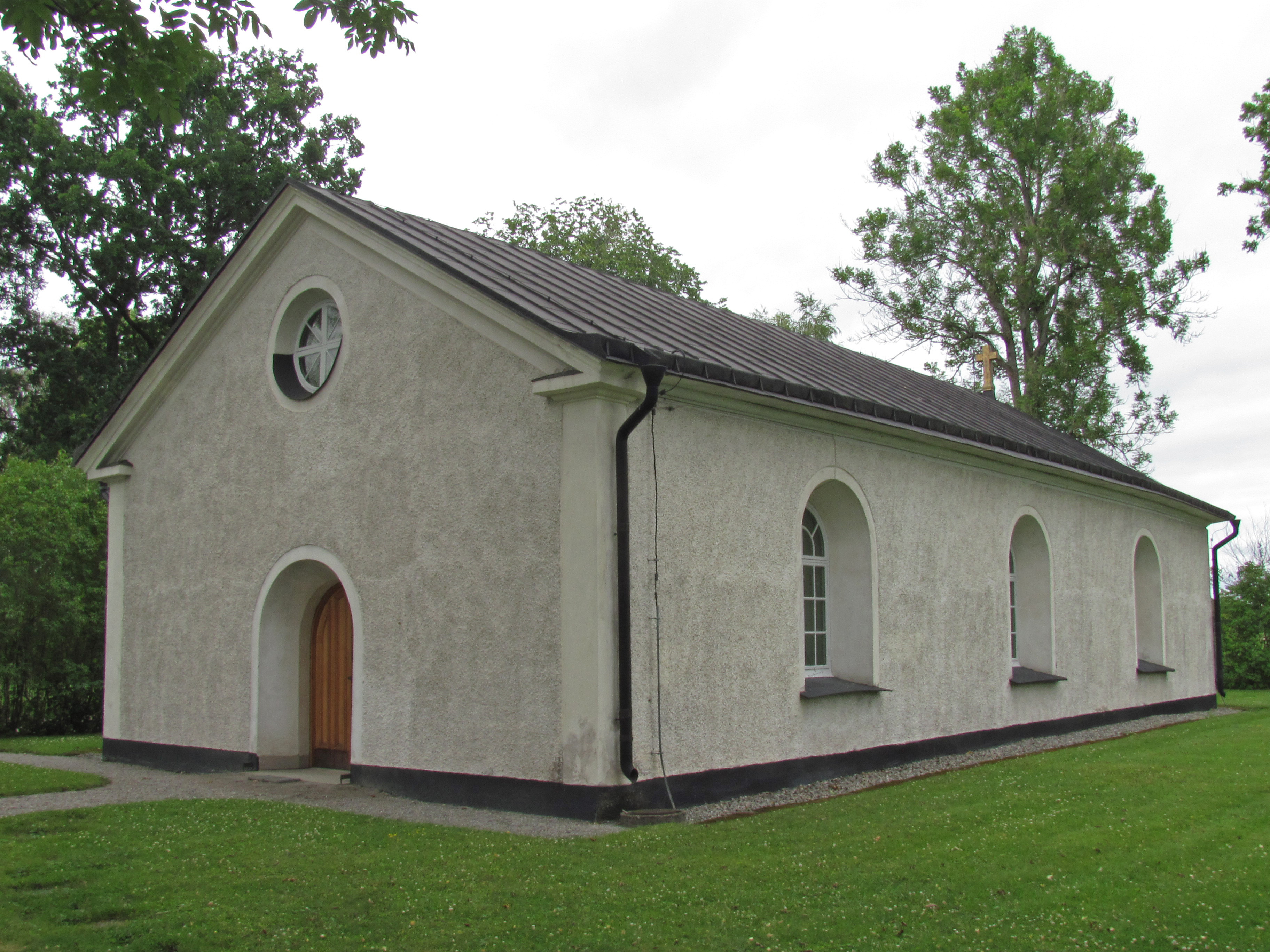 Lillhärads kyrka